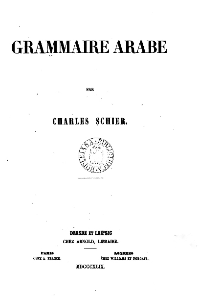 Titelblatt des Buchs "Grammaire arabe" von Karl Heinrich Schier, Dresde et Leipsic, 1849